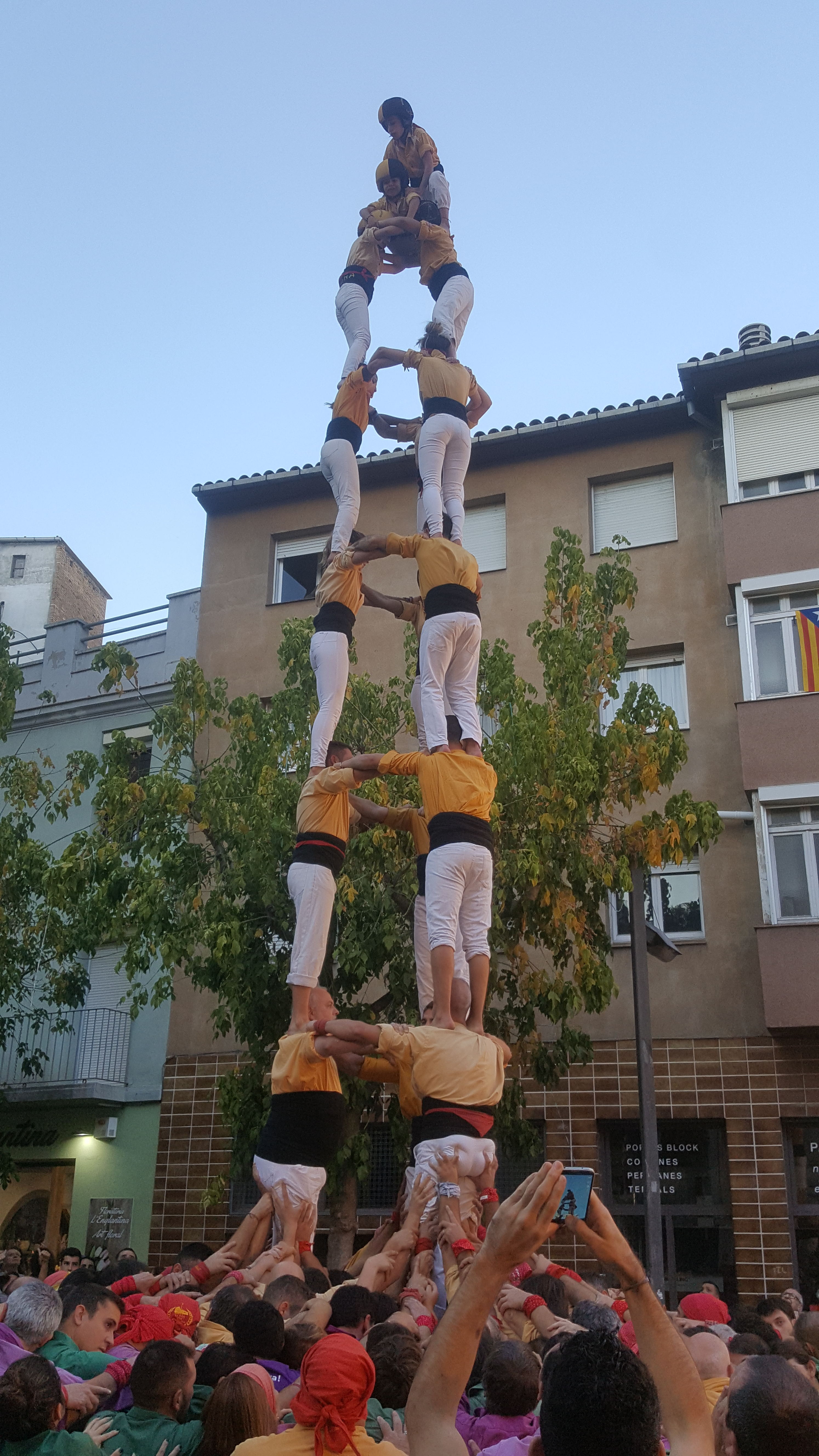 Igualada, plaça de Pius XII. 3d8 dels Bordegassos de Vilanova